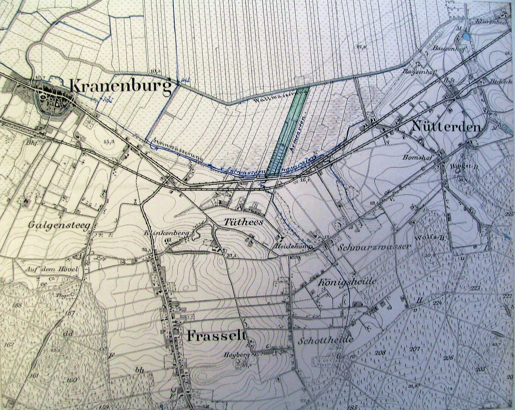 Übersichtskarte des Melorationsgebietes Armenveen, 1905